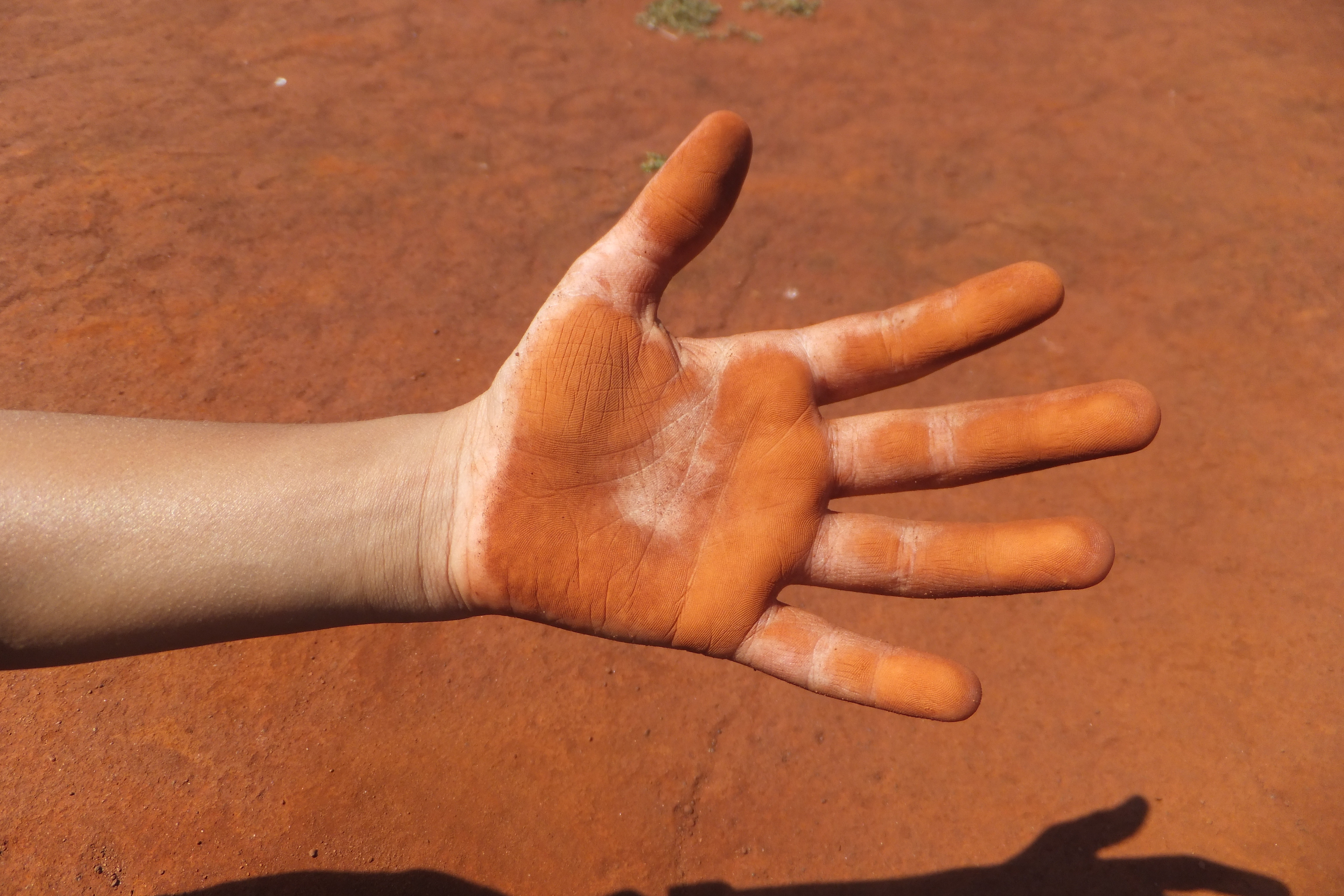 සිංහල: උස්සංගොඩ පොළොව ඇල්ලූ පසු පාට ගෑවුනු අතක්